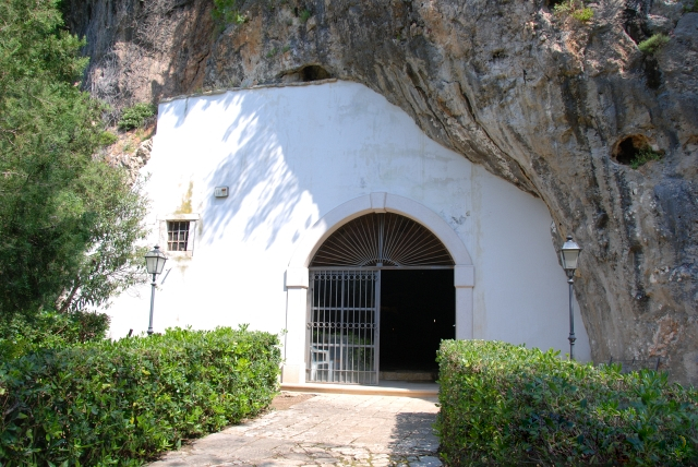 Ingresso della Grotta di San Michele a Cagnano Varano, nel Gargano